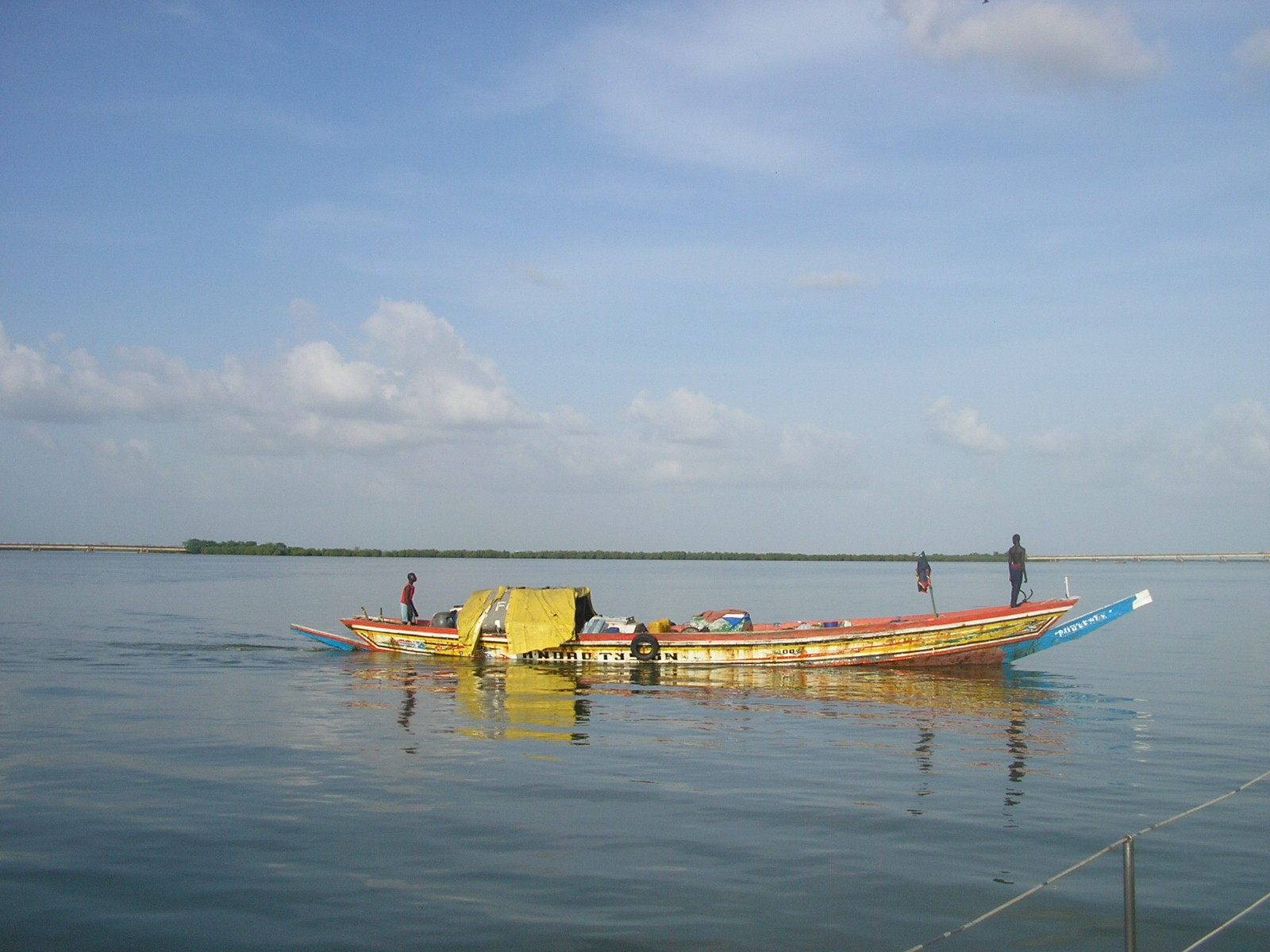 Photo prise sur le fleuve casamance (sénégal) mettant en relief une pirogue typique de la région.